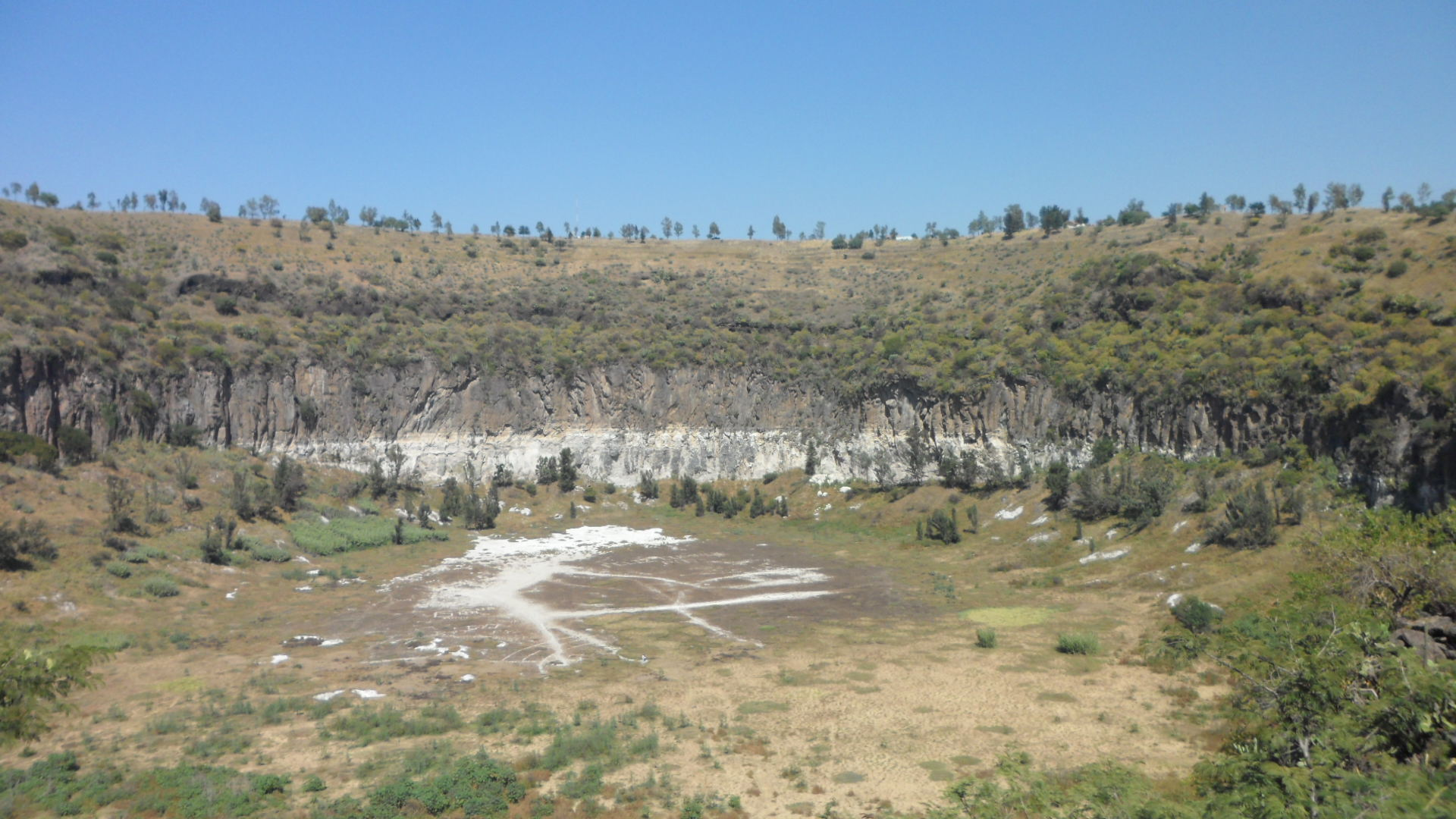 Crater "La Alberca", en Valle de Santiago, Guanajuato.